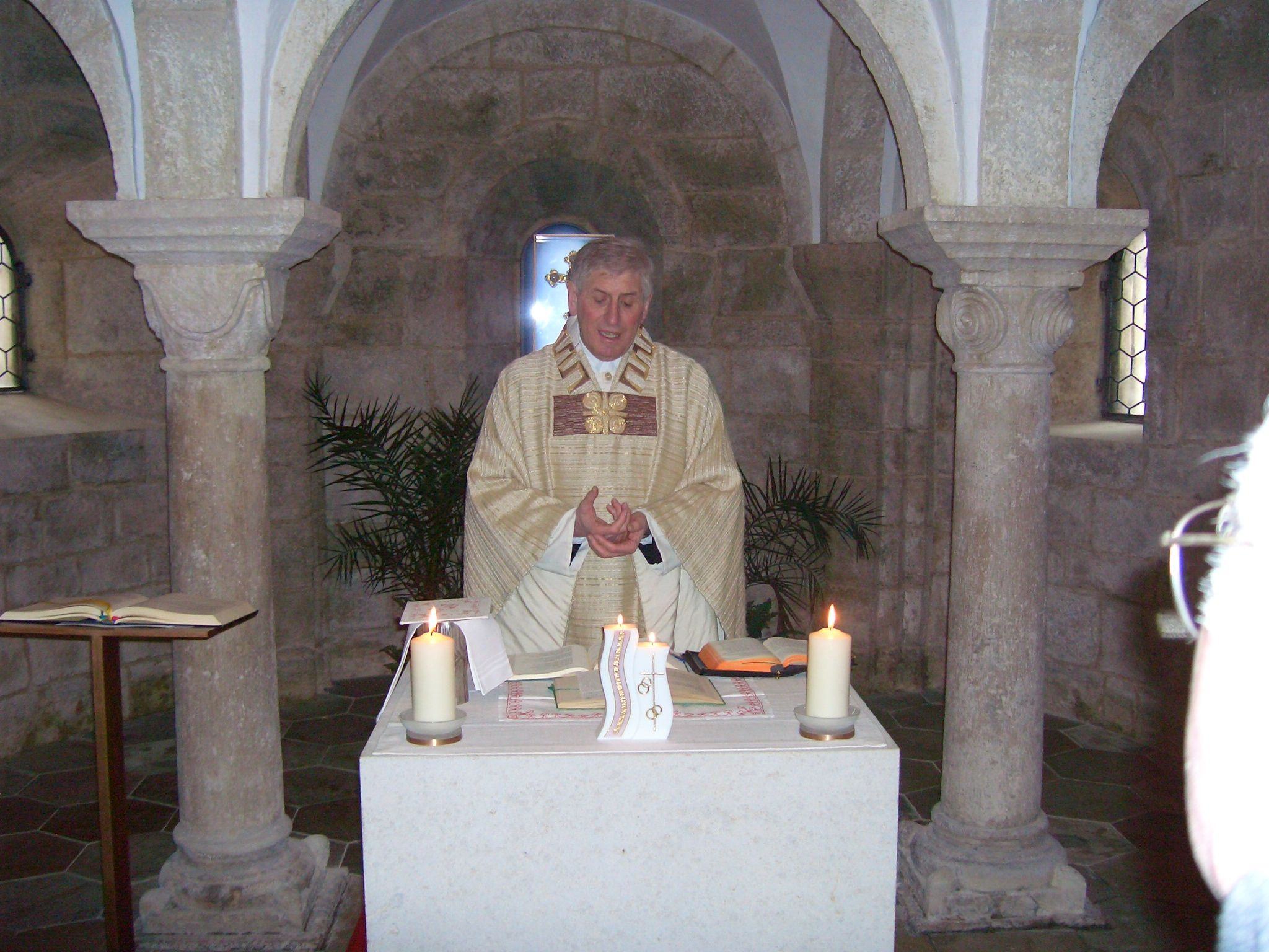 Der Volksaltar in der Krypta der Pfarrkirche Bergen bei Neuburg-Donau